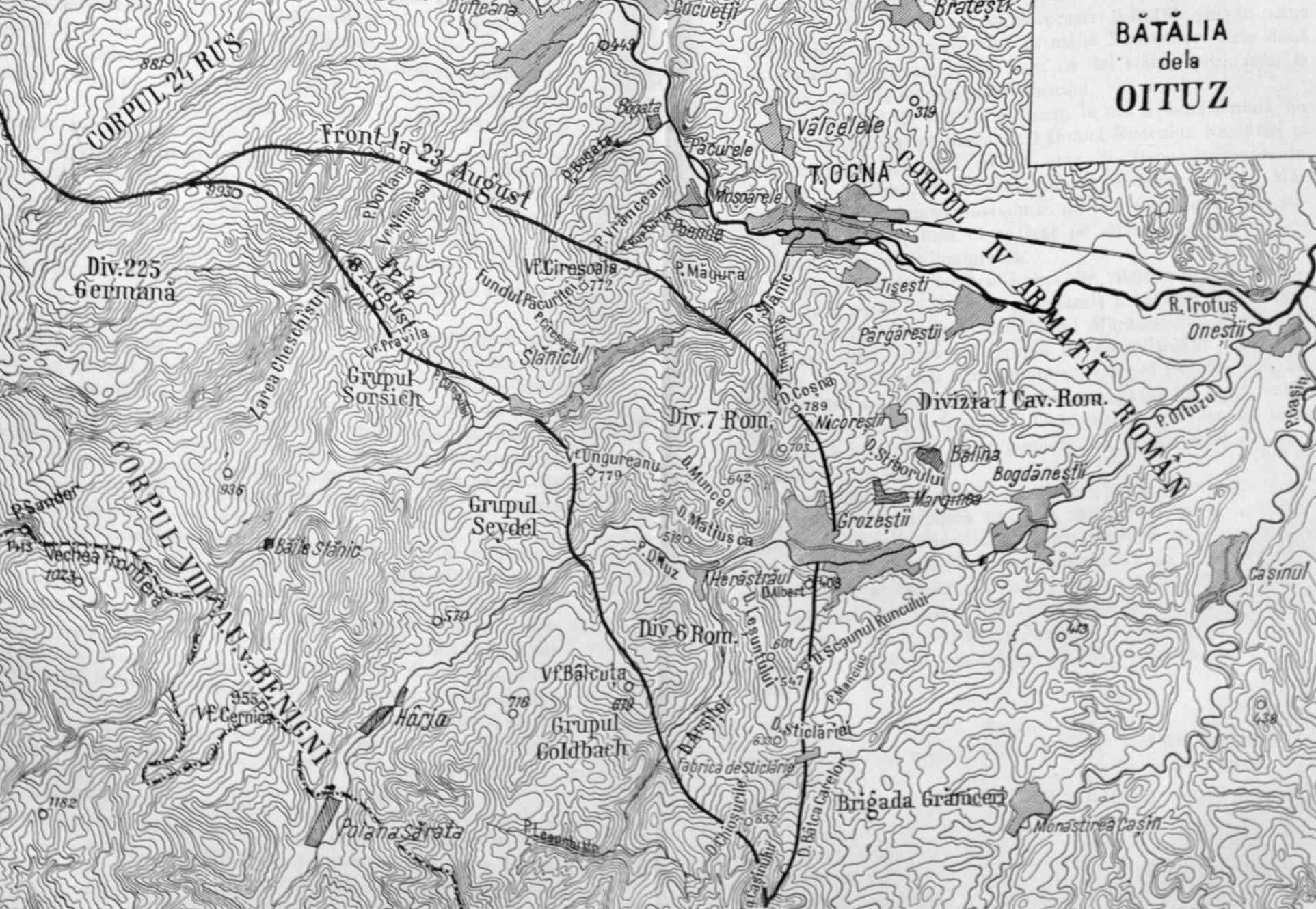 D - Harta Bataliei de la Oituz Kiritescu II 609